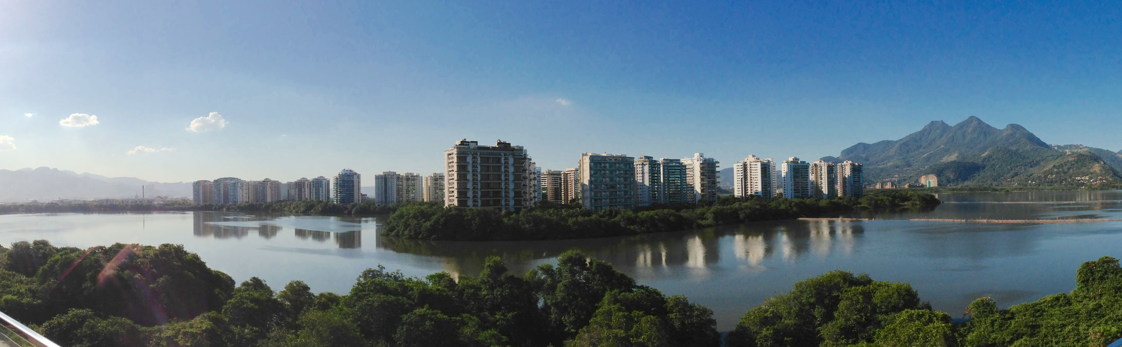 Vista da Península do terraço do shopping VillageMall.